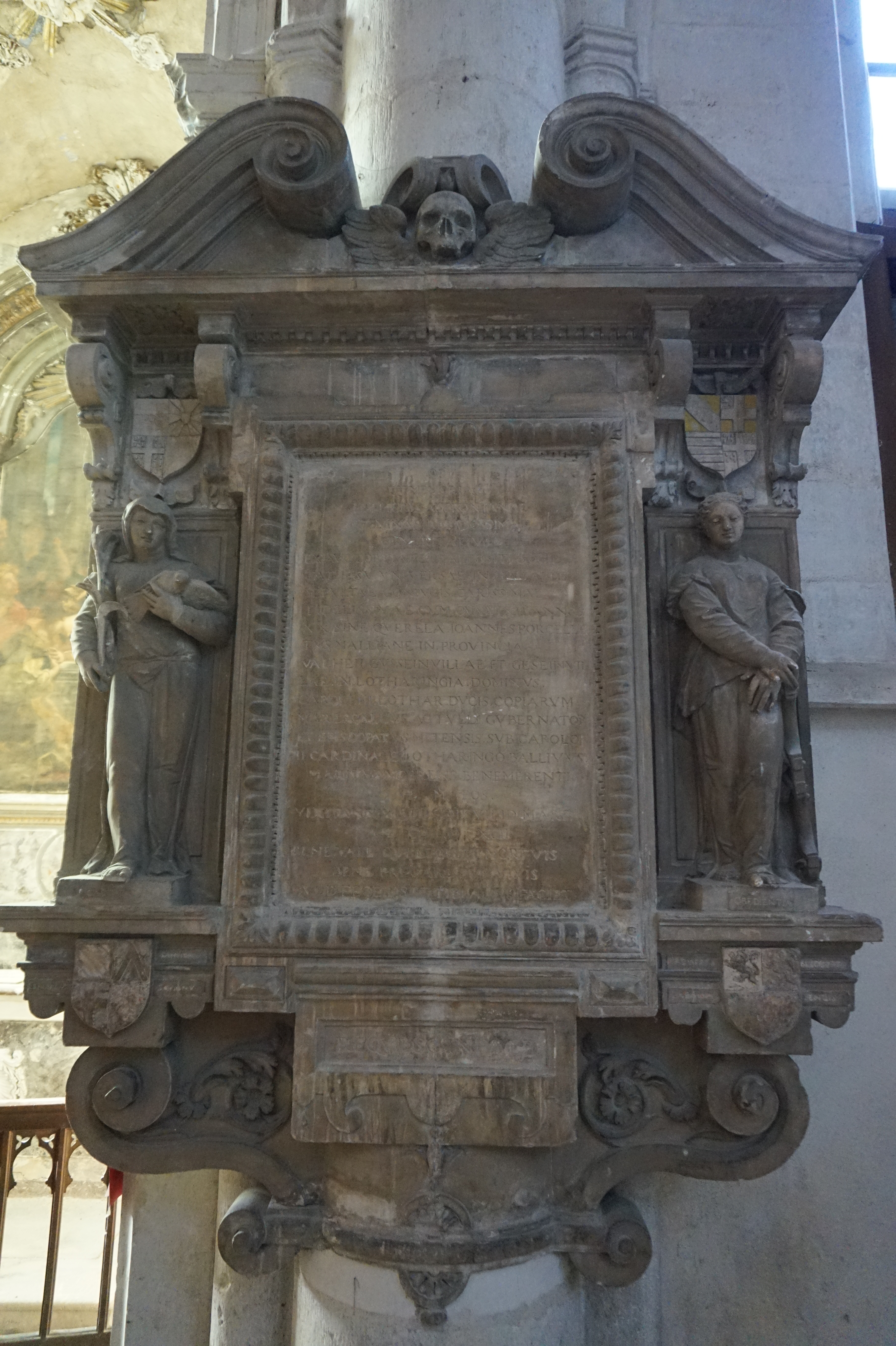 Pont-à-Mousson monument funéraire mural en l'église Saint-Martin : à la mémoire d'Esther d'Apremont, morte en mars 1592, femme de Jean des Porcelets de Maillane, maréchal de Lorraine, et mère de Jean des Porcelets de Maillane, évêque de Toul.